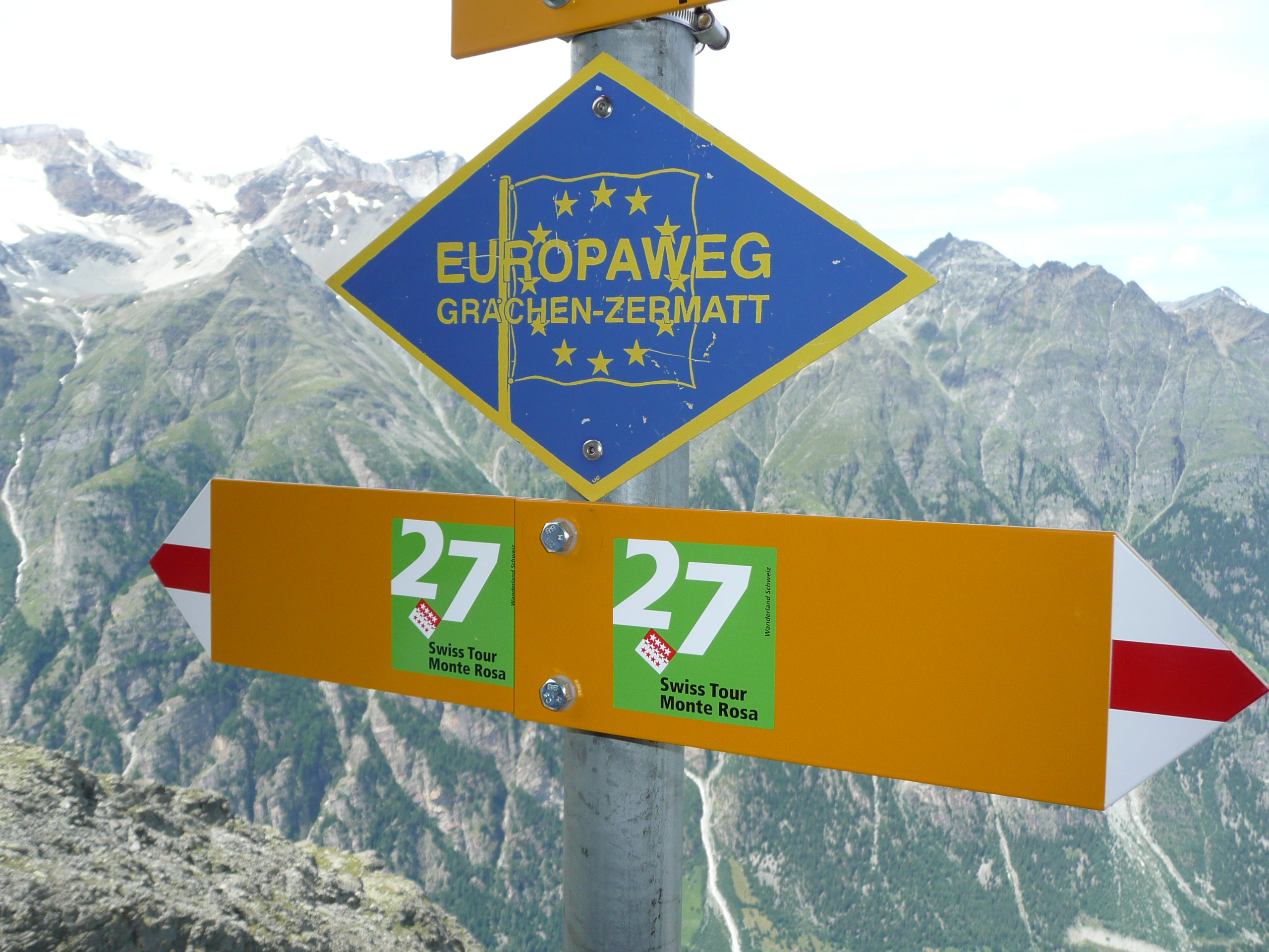 Alte und neue Beschilderung des Europaweges